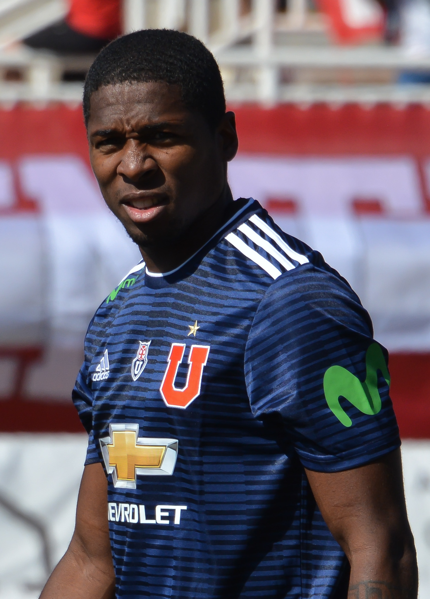 Unión La Calera v Universidad de Chile, Estadio Municipal Lucio Fariña Fernández, Quillota, Chile.